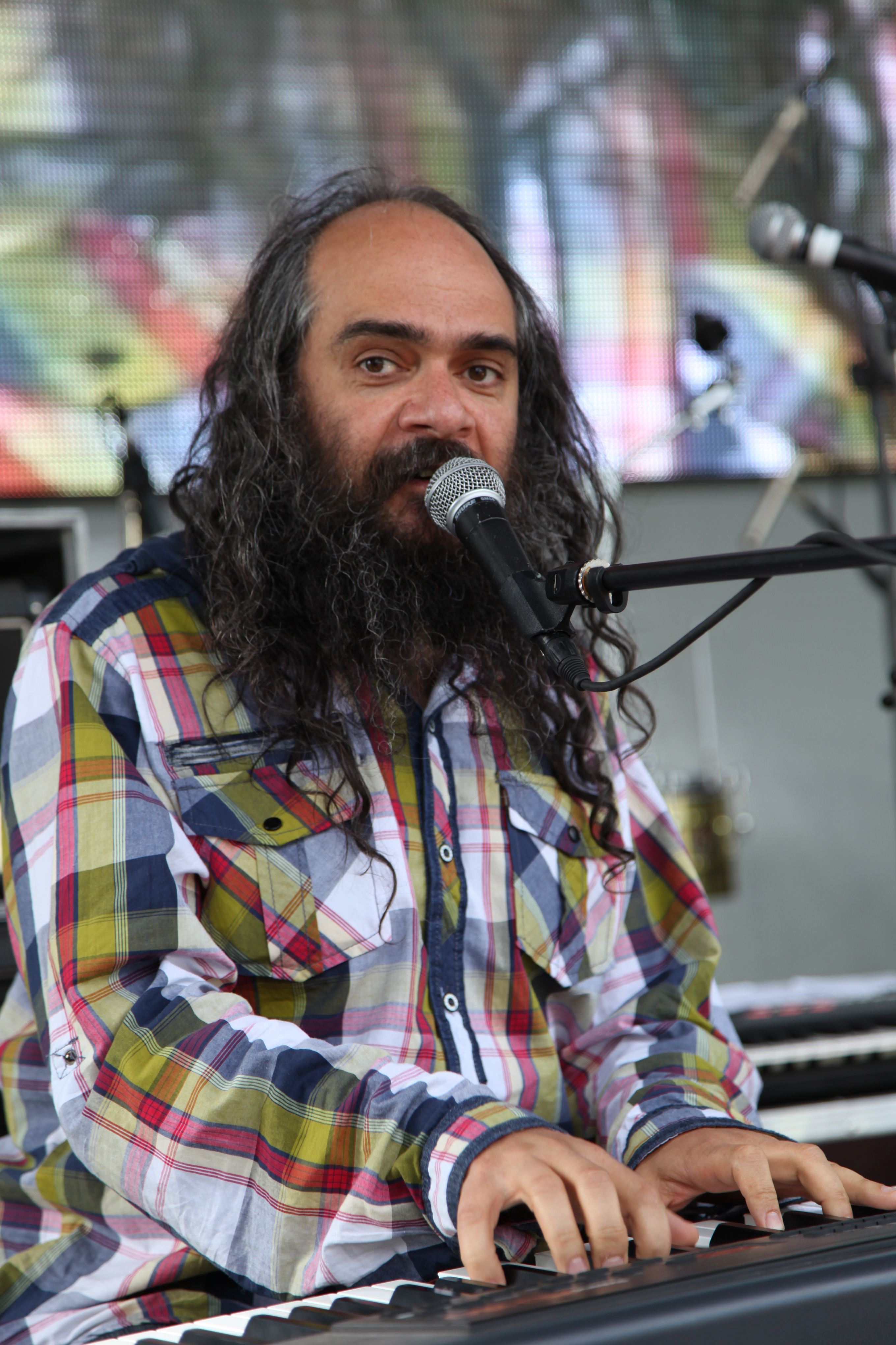 Музыкант Псой Галактионович Короленко на фестивале «Пилорама»-2012, Пермь